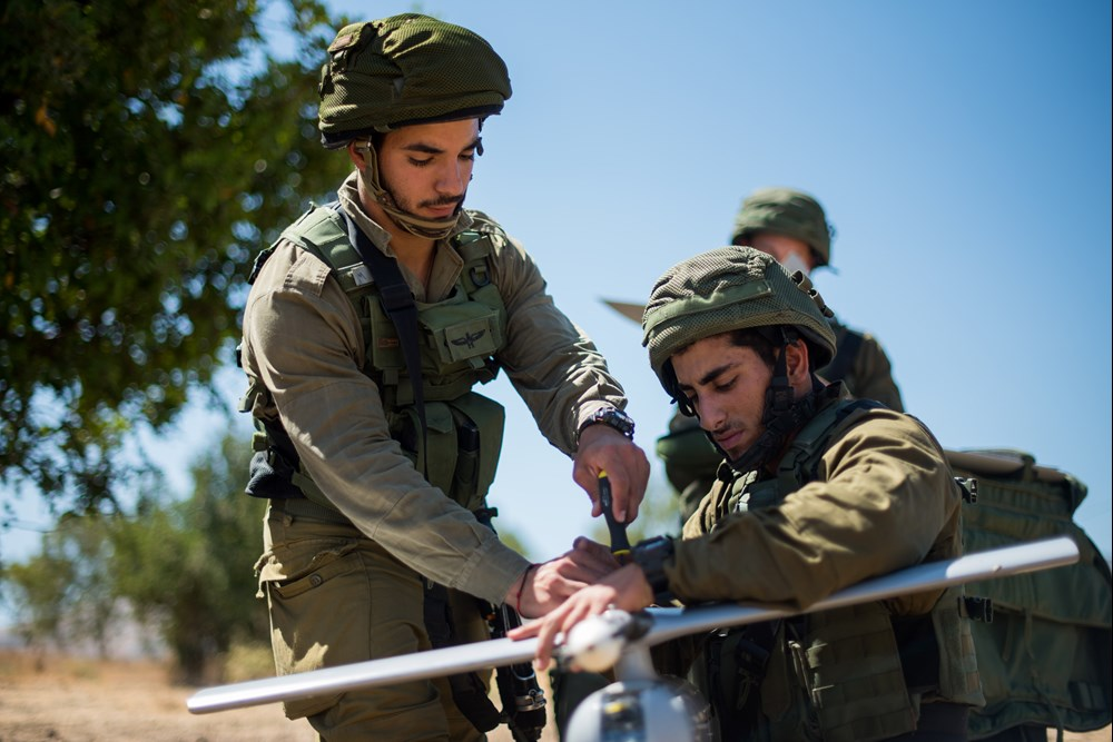 החידושים שהופכים את כוח האש של צה"ל למדויק ועוצמתי הרבה יותר. יחידת "רוכב שמיים" של חיל התותחנים.